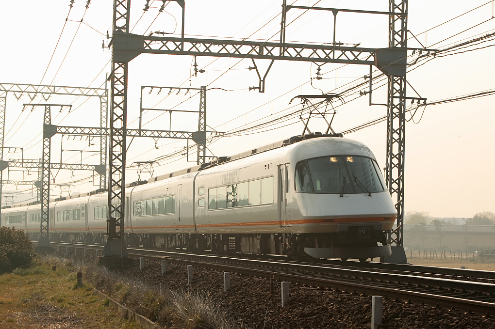 Kintetsu 21000 series EMU, Urban Liner Plus on Kintetu Nara Line